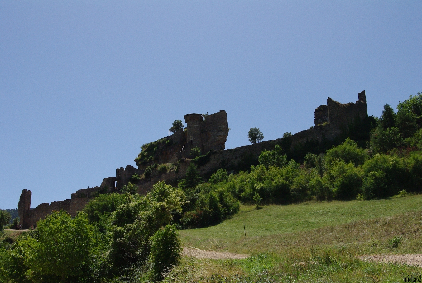 Château de Peyrelade vue du bas